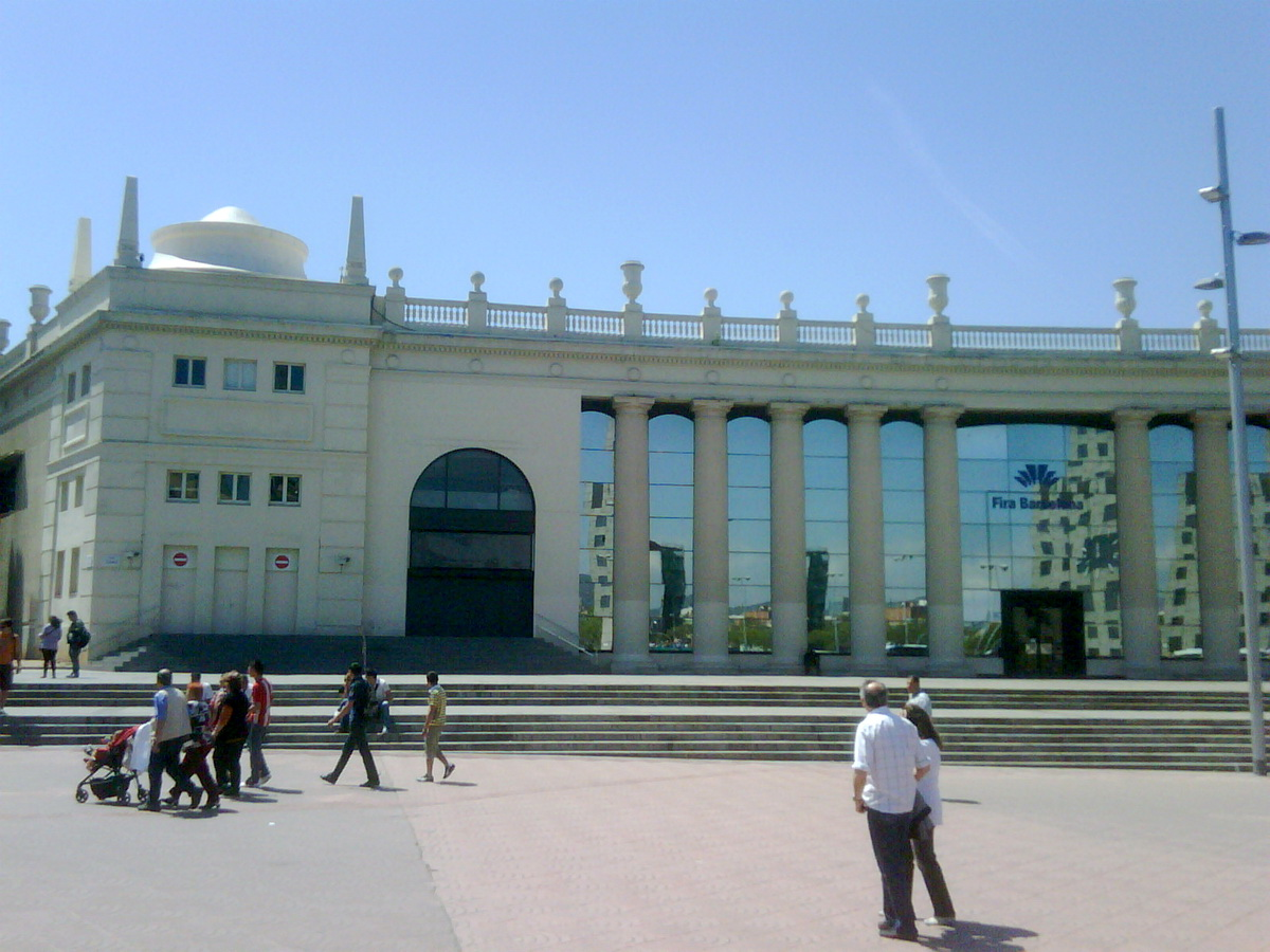 Palau del Vestit (actual Fira de Barcelona), a Barcelona(Catalunya), obra de Josep Maria Jujol de 1927.